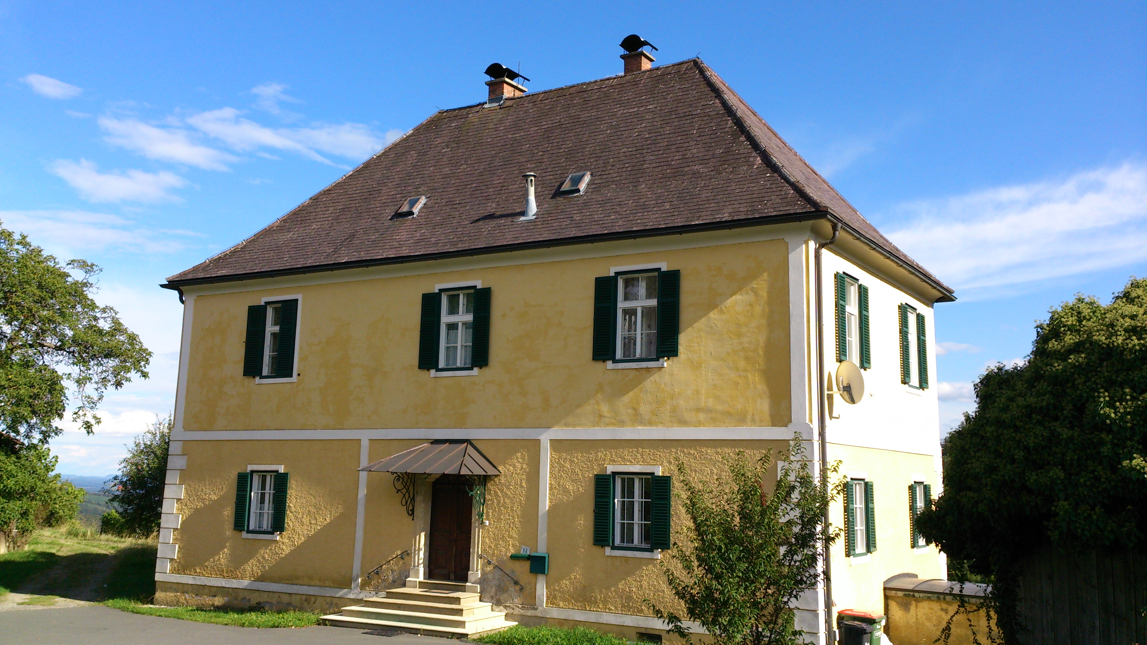 Pfarrhof